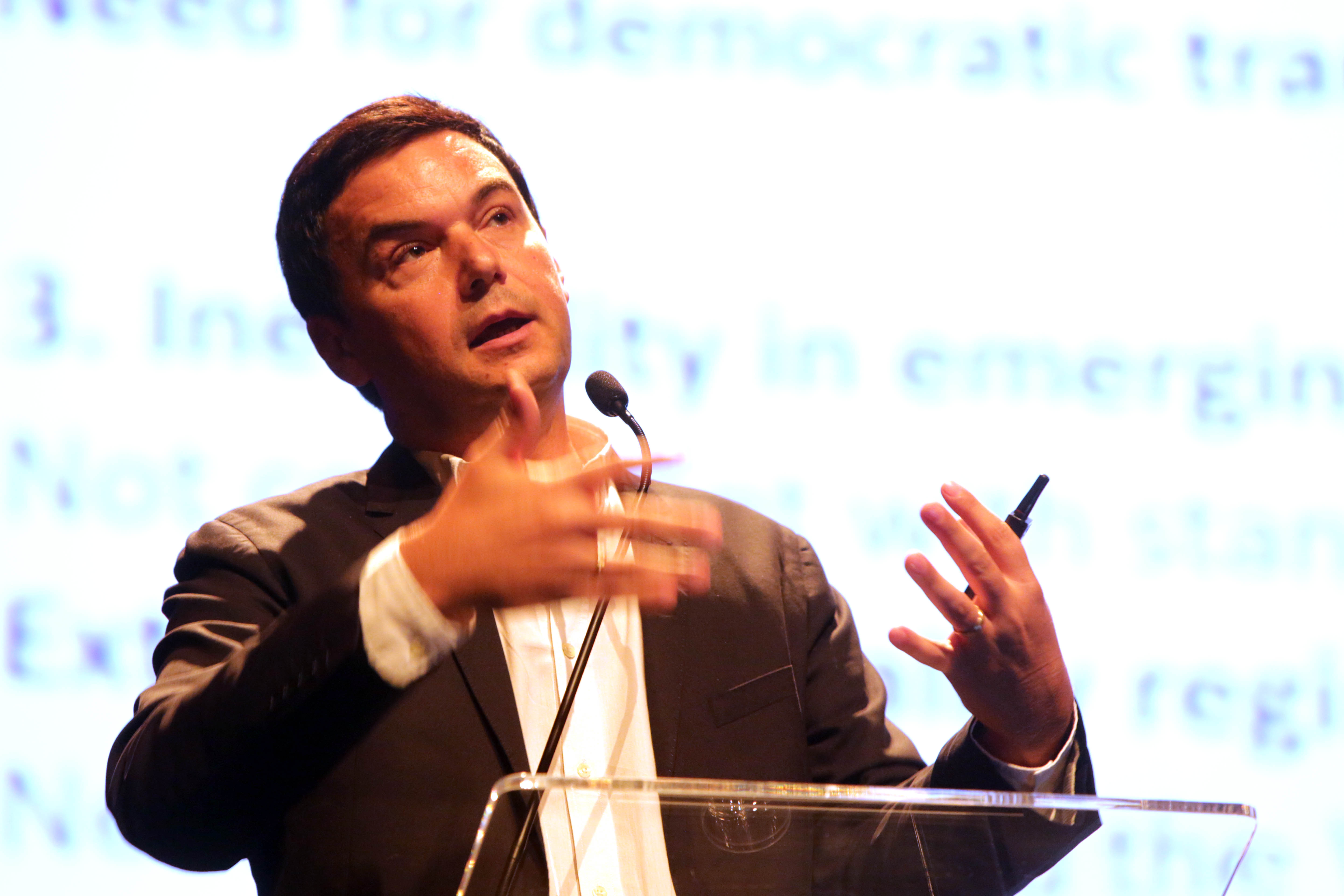 Convidado: Thomas Piketty, economista francês Data: 27 de setembro de 2017 Local: Teatro Santander Crédito das imagens: Fronteiras do Pensamento / Greg Salibian